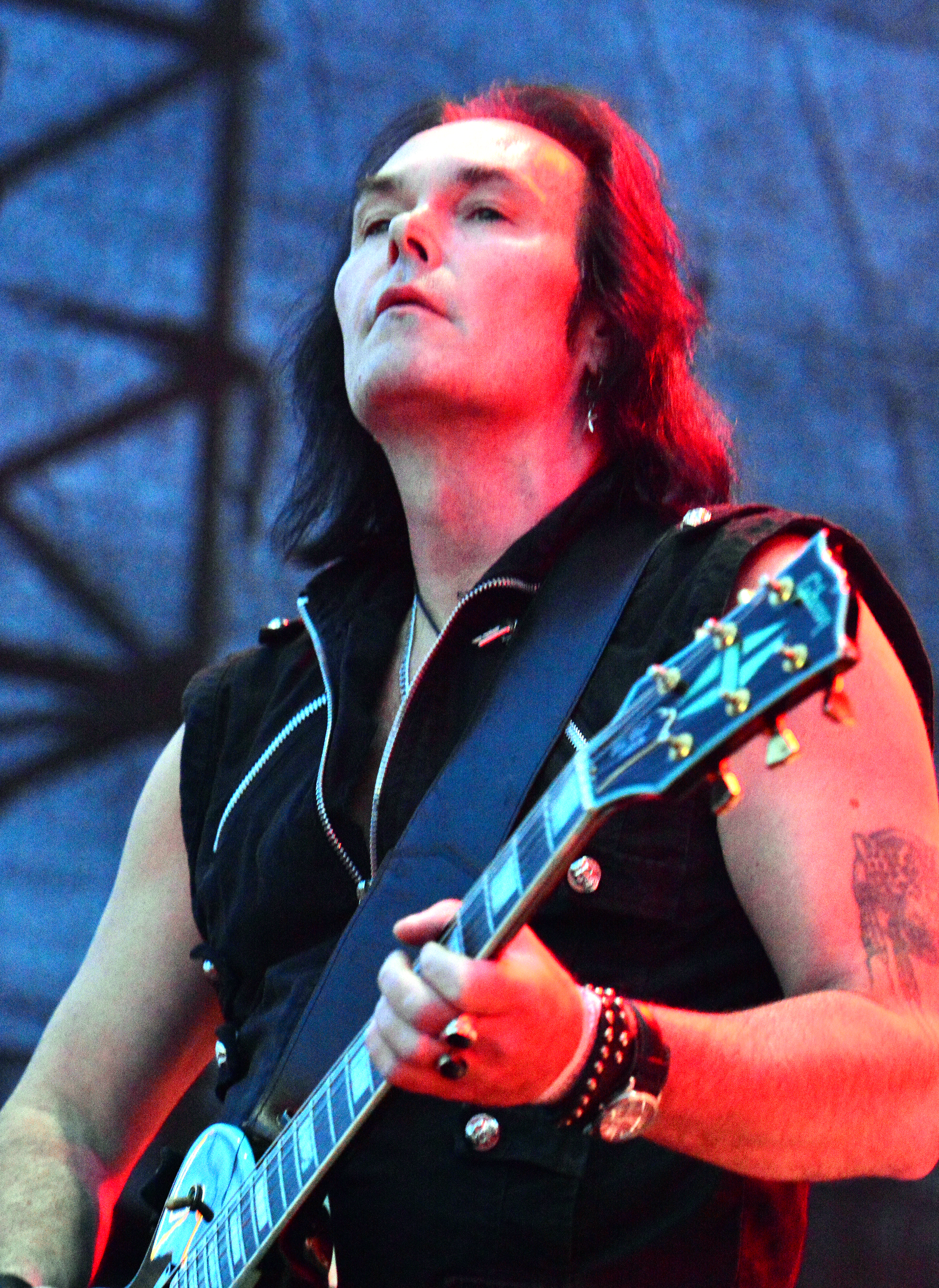 Yenz Leonhardt von Lacrimosa, Stormwarrior, Saxon, Kingdome Come und Bon Scott beim Tower-Festival 2014